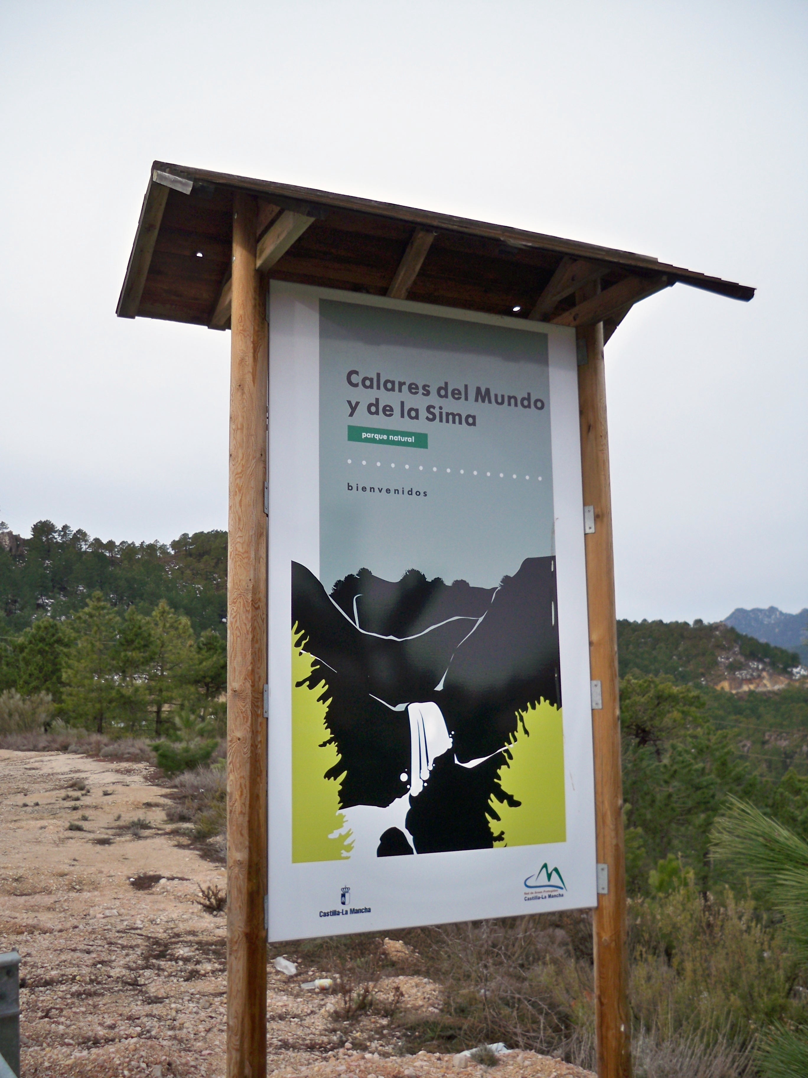 Cartel de bienvenida al Parque Natural de los Calares del Mundo y de la Sima desde el Pardal (Molinicos - Albacete)